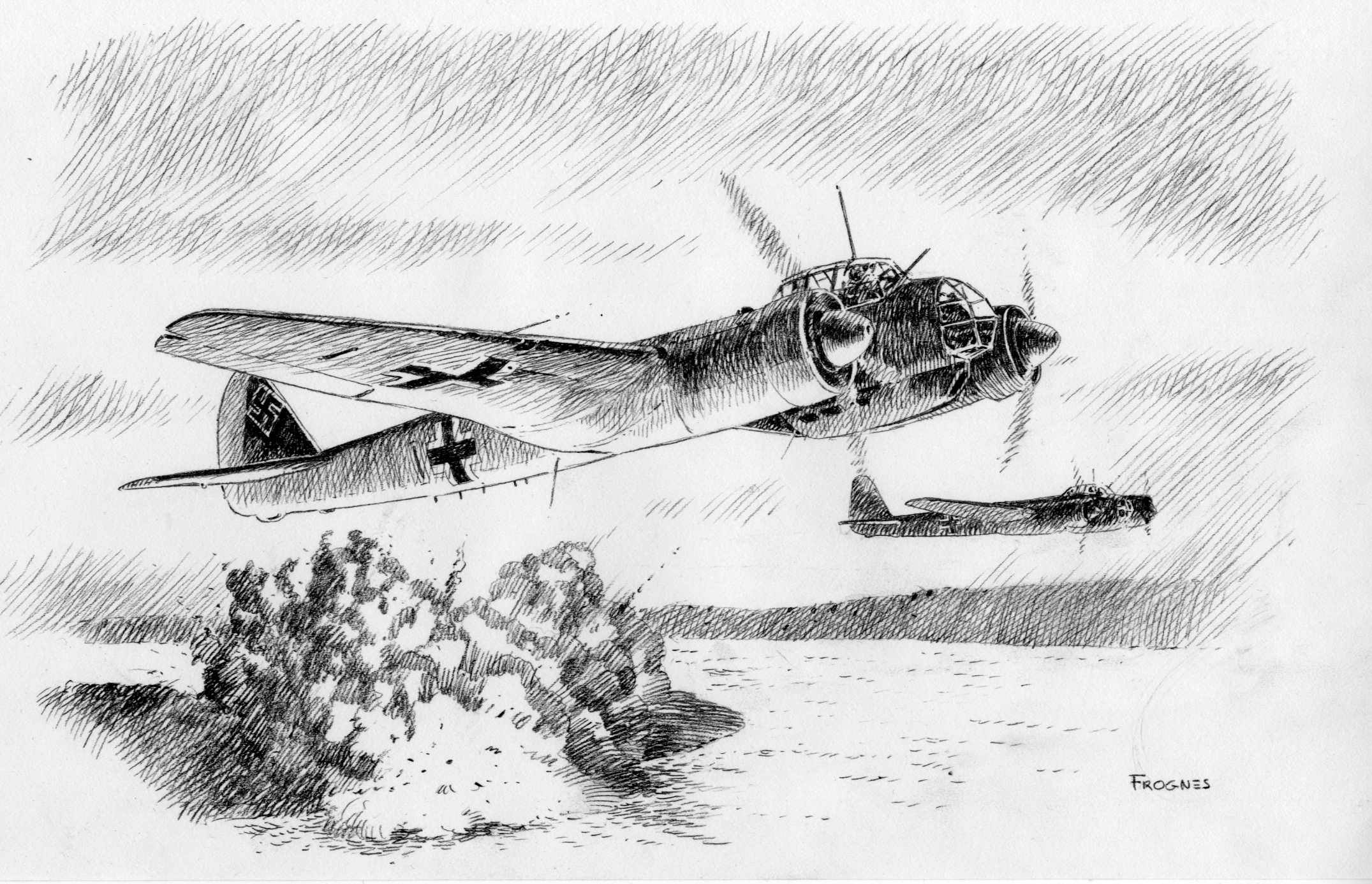 2. Verdenskrig - angrepet på Norge 1940